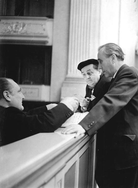 Zentralbild-Kemlein Ulm-Ku 2.1.58 Werner Egk dirigiert in der Deutschen Staatsoper Werner Egk wird am 14. Januar 1957 seine Oper "Der Revisor" in der Deutschen Staatsoper Berlin selbst dirigieren. UBz. Zu einer Probenpause zu "Der Revisor" v.l.n.r.: Generalmusikdirektor Franz Konwitschny, Generalintendant Max Burghardt und Werner Egk."